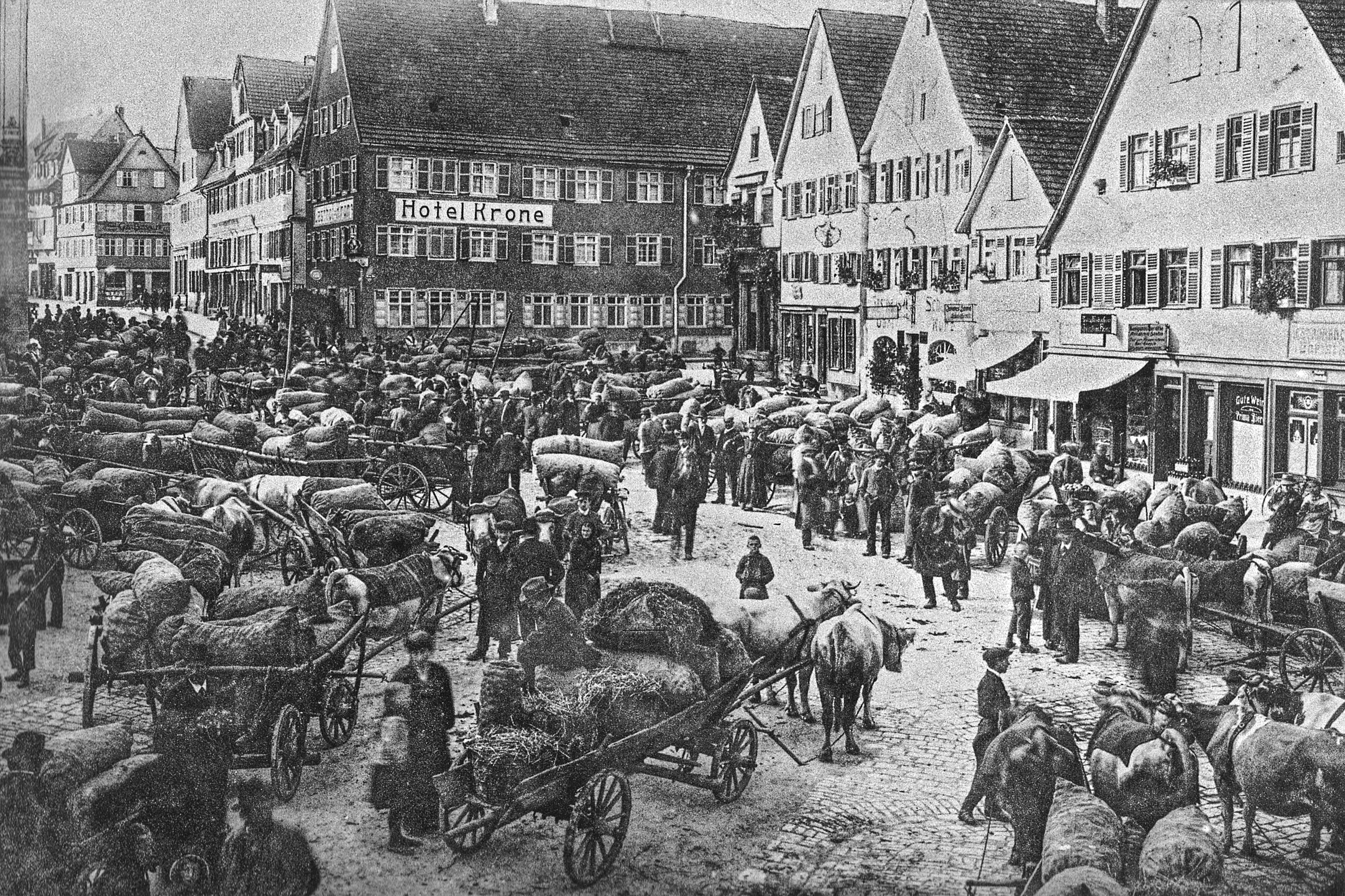 Markttag in Schorndorf um 1900